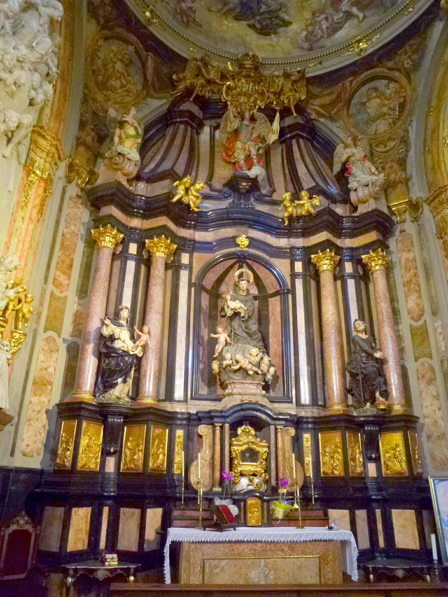 Zaragoza - Basílica del Pilar - Capilla de San Antonio de Padua